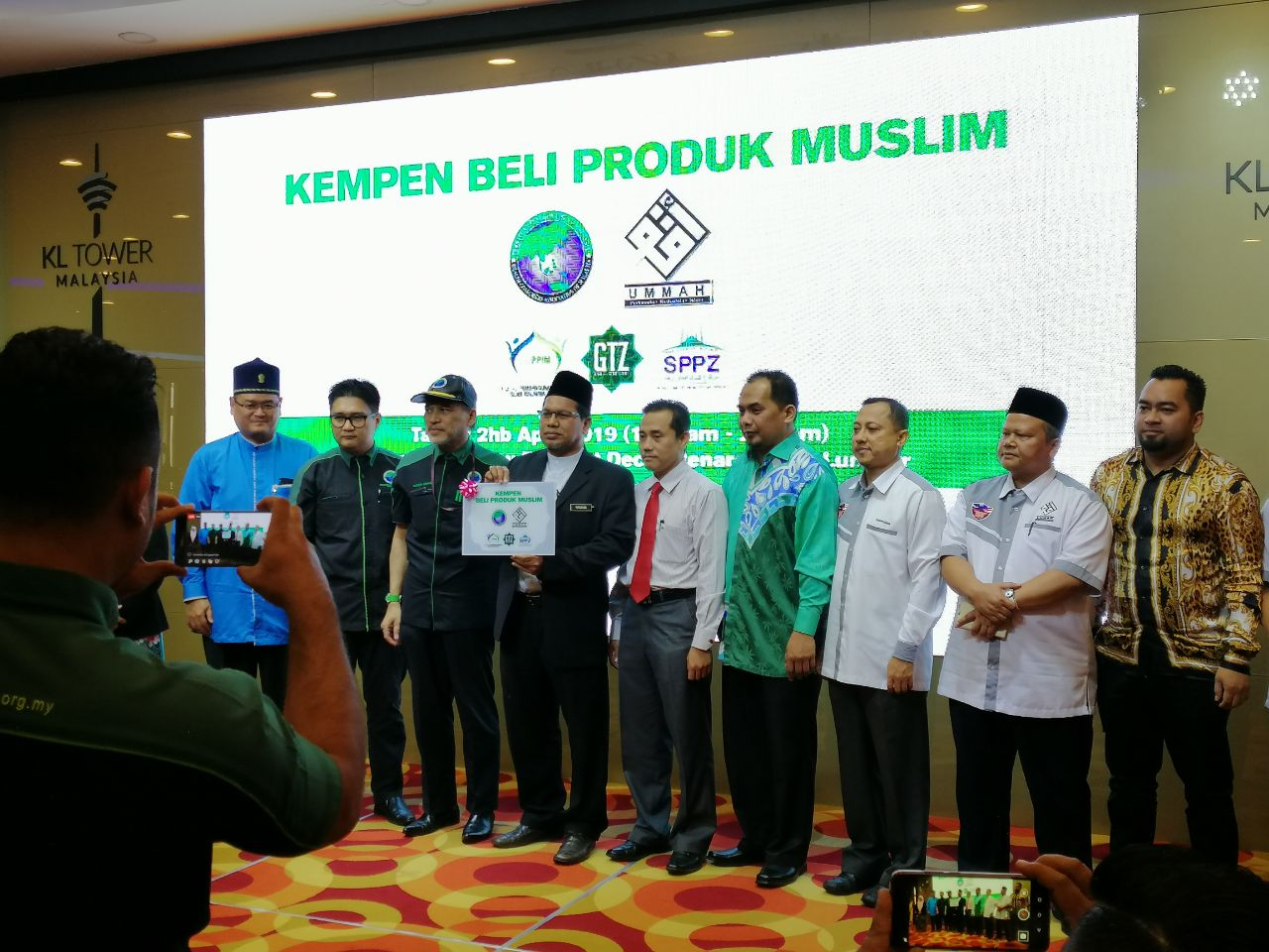 Pelancaran Kempen Beli Produk Muslim anjuran UMMAH dan PPIM di Menara Kuala Lumpur pada 2 April 2019.